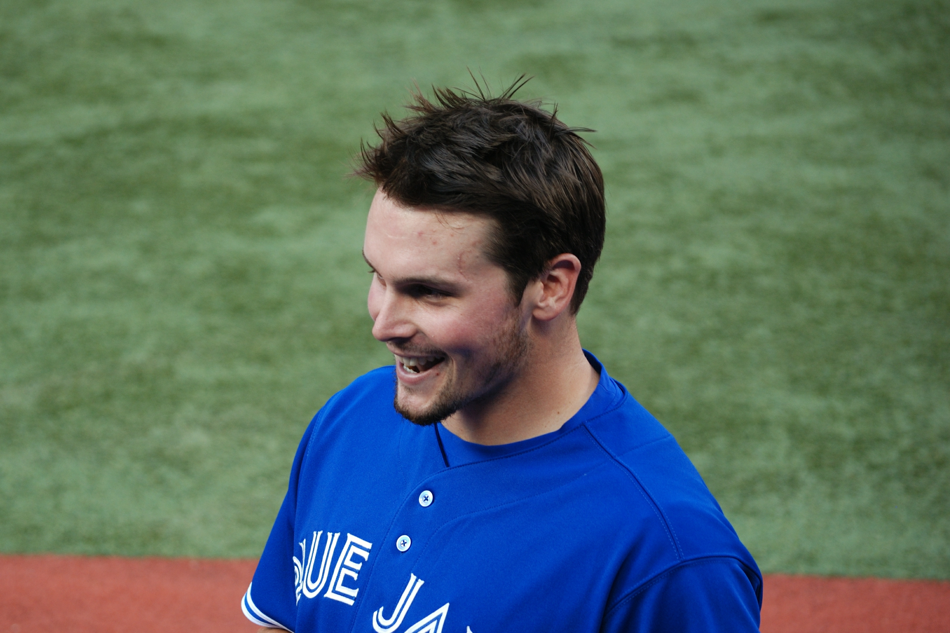 Travis Snider